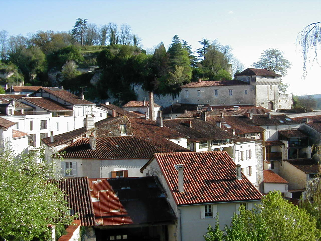 vue d'Aubeterre-sur-Dronne et du château